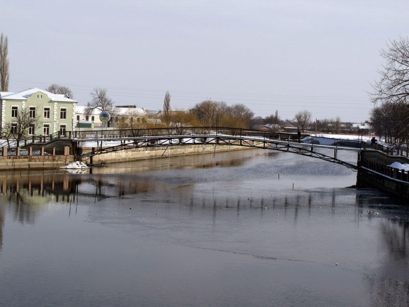 Пешеходный мост через р. Ингул в Кировограде